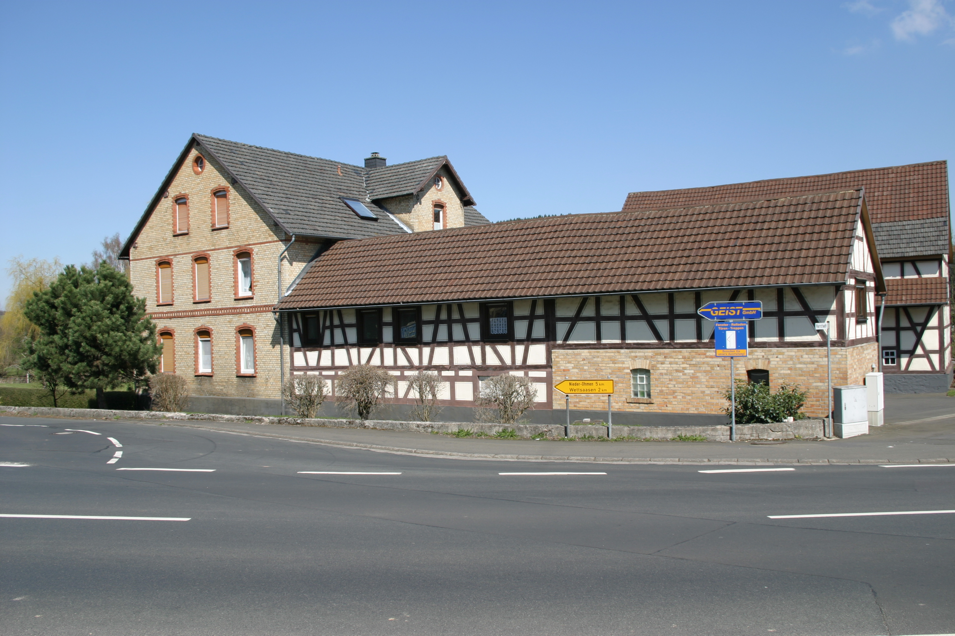 Brückenmühle Mücke Ruppertenrod 10.04.2004